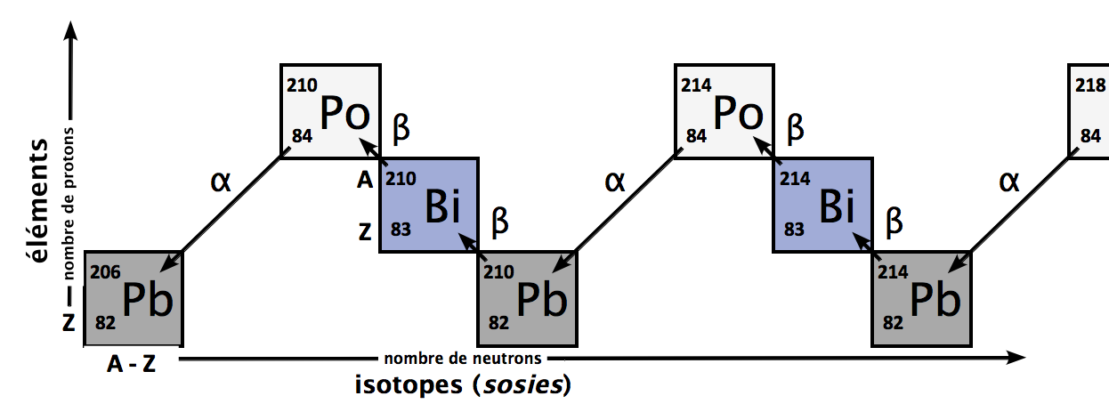 chaîne de désintégration, nucléaire, atome, isotope, alpha, bêta, émission